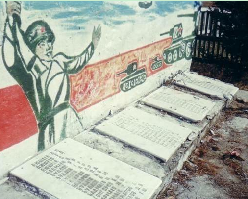 Мемориал воинам-односельчанам в у.Утата